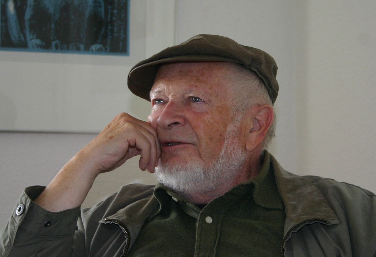 Der Maler Karlheinz Wenzel während eines Museumsbesuchs in Burg Stargard.